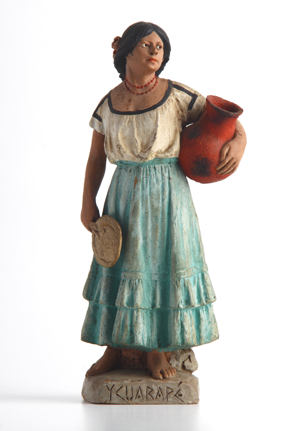 Escultura de Serafin Marsal, com a representação de uma mulher indígena carregando um jarro de barro.